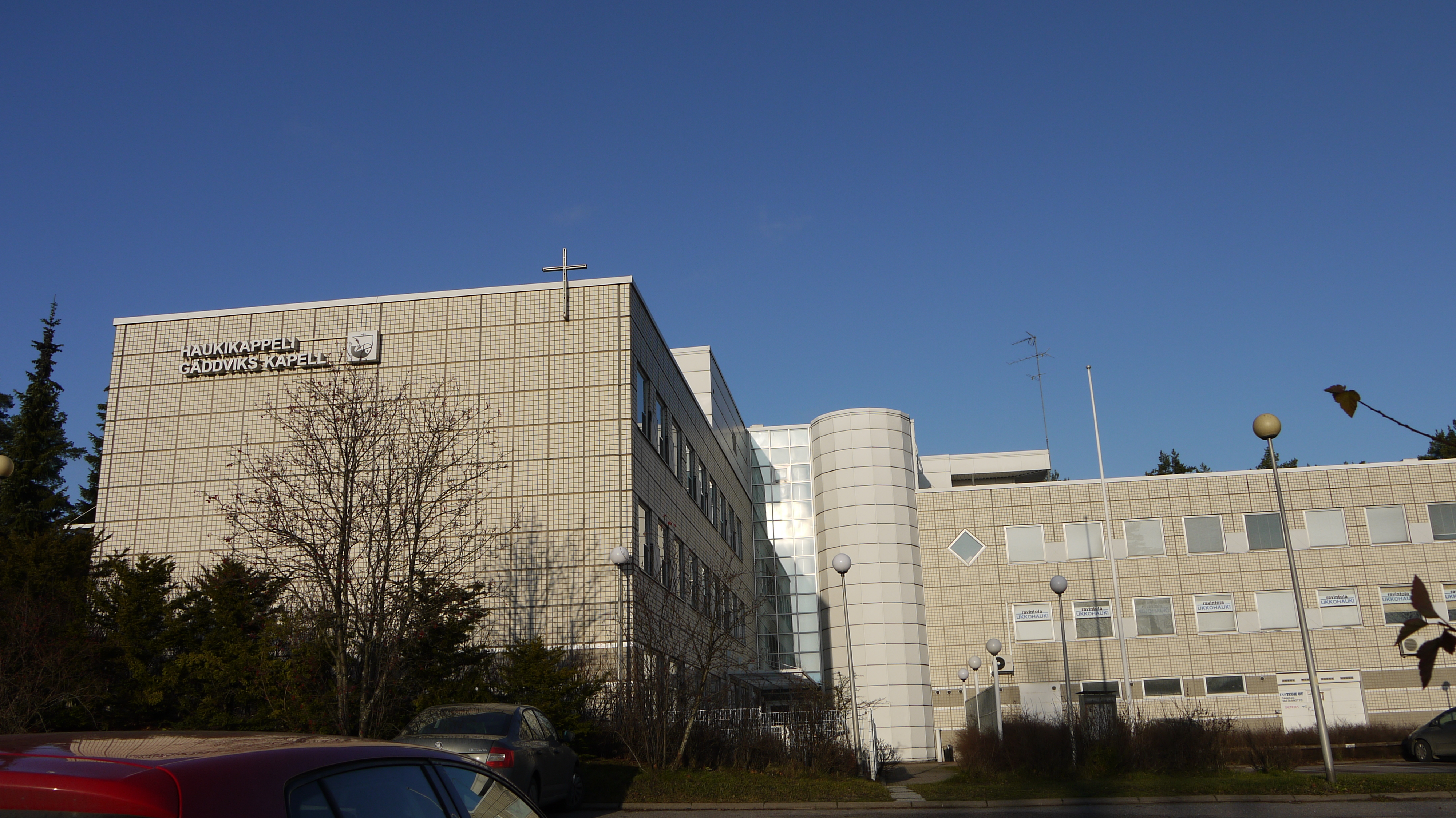 Haukilahden kauppakeskuksen lähellä sijaitseva Haukikappeli